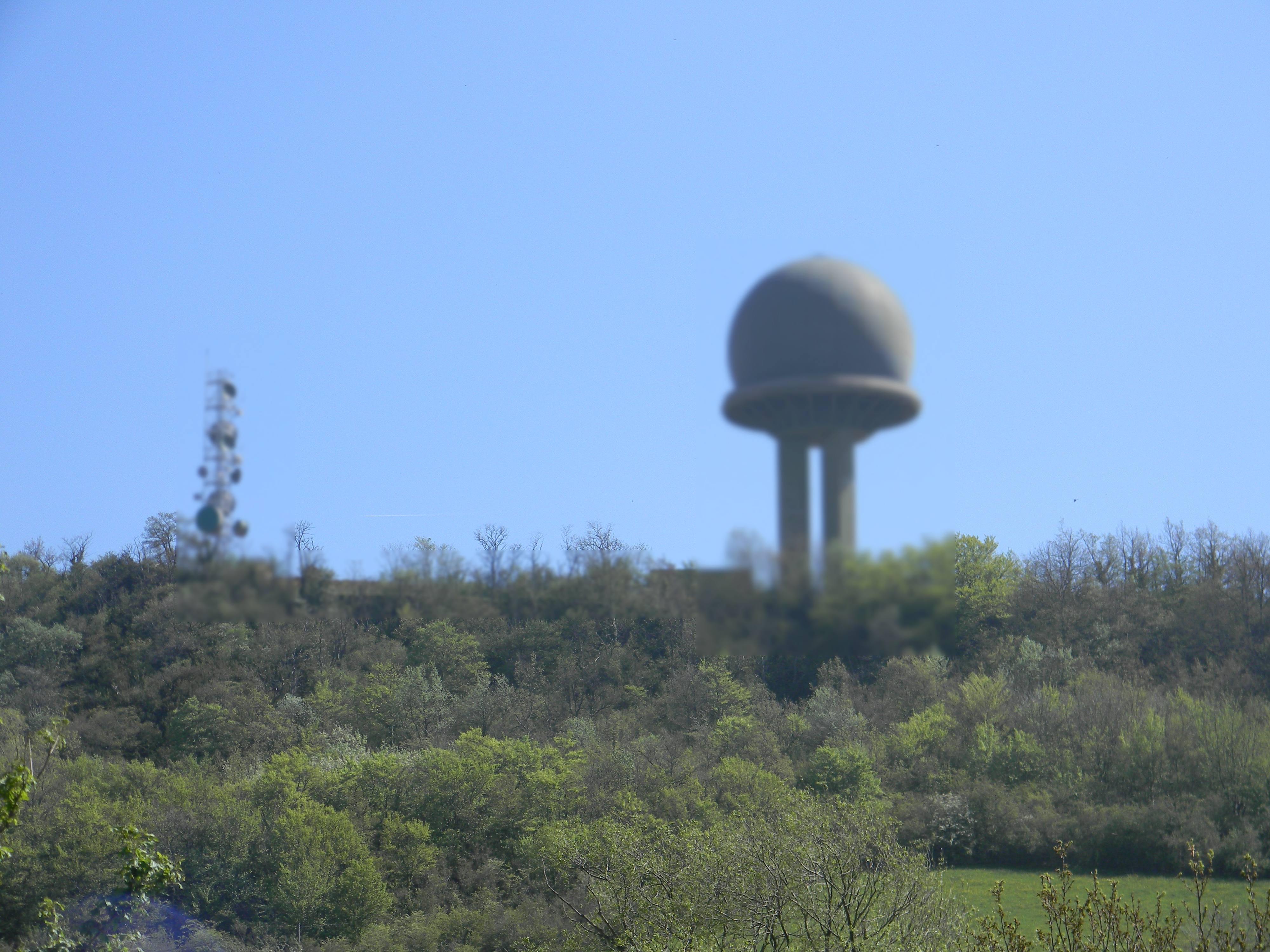 Radar militaire de la base aérienne du Mont Verdun, près de Lyon.